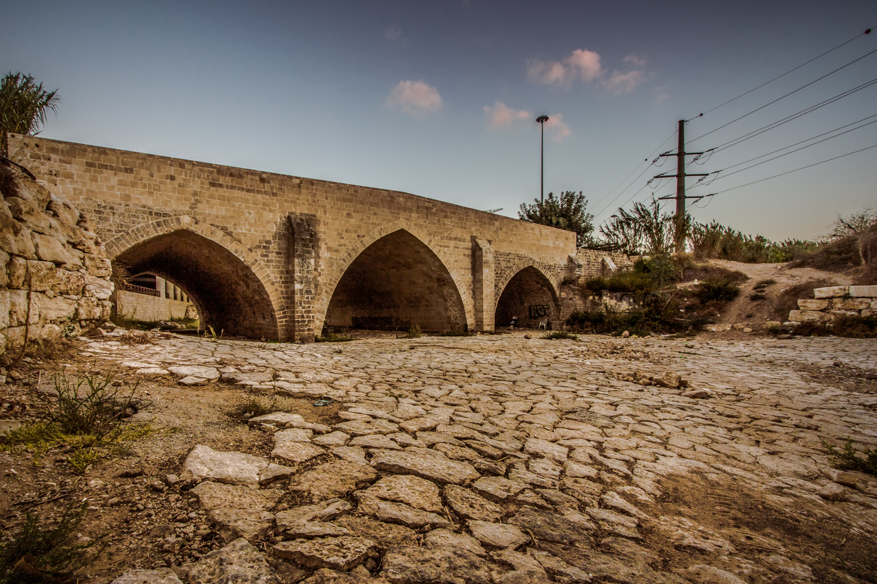 גשר עד הלום הוא גשר על נחל לכיש החוצה את כביש 4 ליד אשדוד, מרחק של 35 ק"מ דרומית מתל אביב, סמוך למחלף אשדוד דרום של ימינו. זהו המקום הצפוני ביותר שאליו הגיע הצבא המצרי שפלש לארץ ישראל במלחמת העצמאות במטרה להשמיד את מדינת ישראל שזה אך הוקמה. לאחר התנגשותו בצה"ל נעצר בגשר, ומכאן שמו "עד הלום". הגשר נבנה בסוף המאה ה-19 בידי השלטון העות'מאני מעל אפיק "ואדי סוכריר" (נחל לכיש) שחצה את הדרך מיבנה ל"אל-מג'דל" (אשקלון). הוא נבנה על יסודותיו של גשר מהתקופה הרומית.